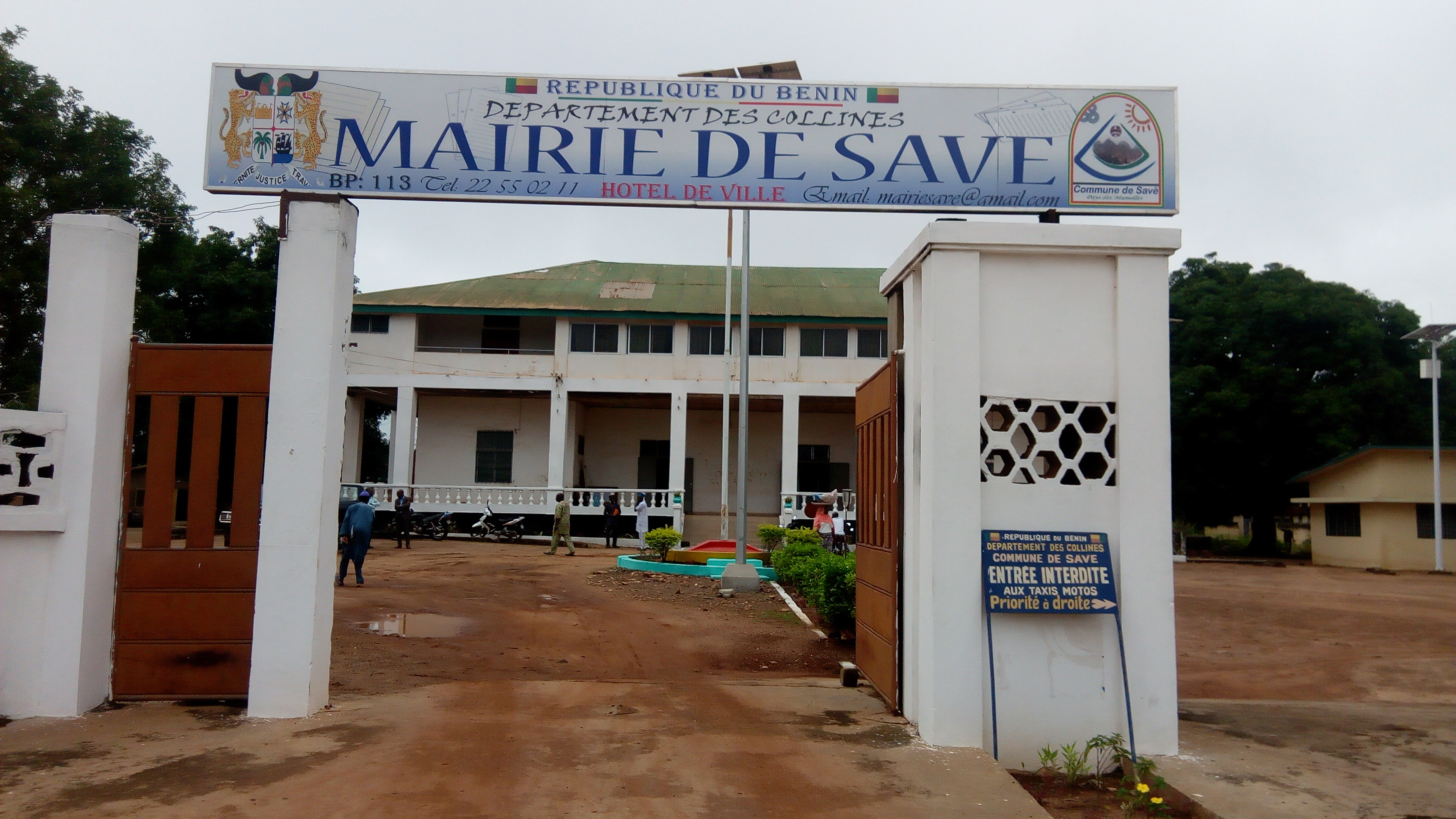 Entrée de la mairie de Savè au Bénin